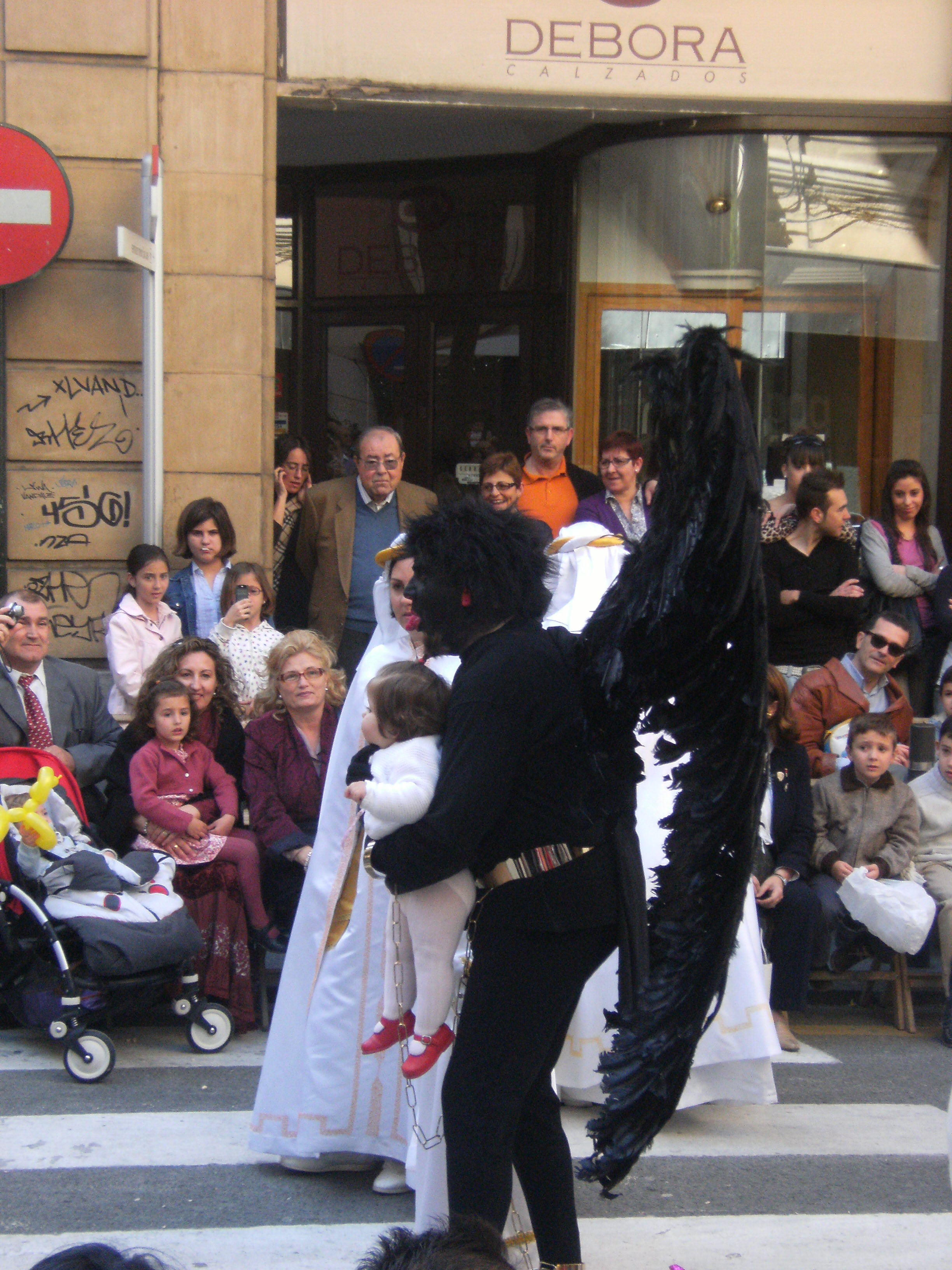 El Demonio Encadenado de la Procesión del Resucitado de Murcia (España)